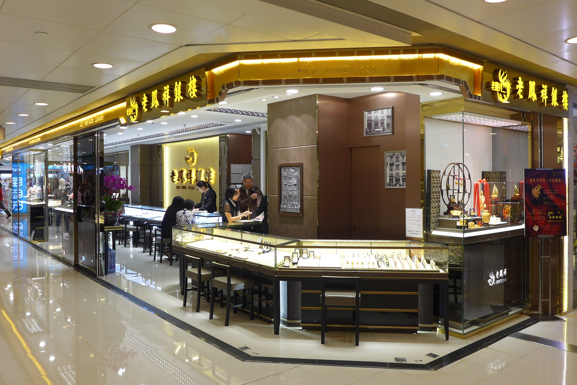 Lao Feng Xiang Jeweller in Shatin Plaza